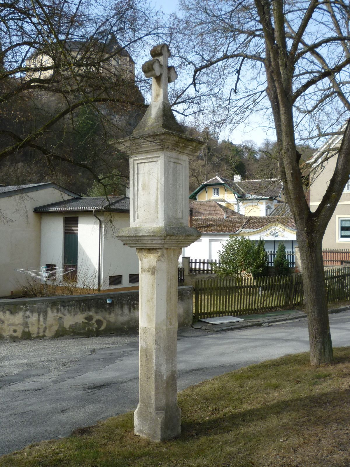 Lesner-Marterl in Rosenburg, Gemeinde Rosenburg-Mold, Niederösterreich